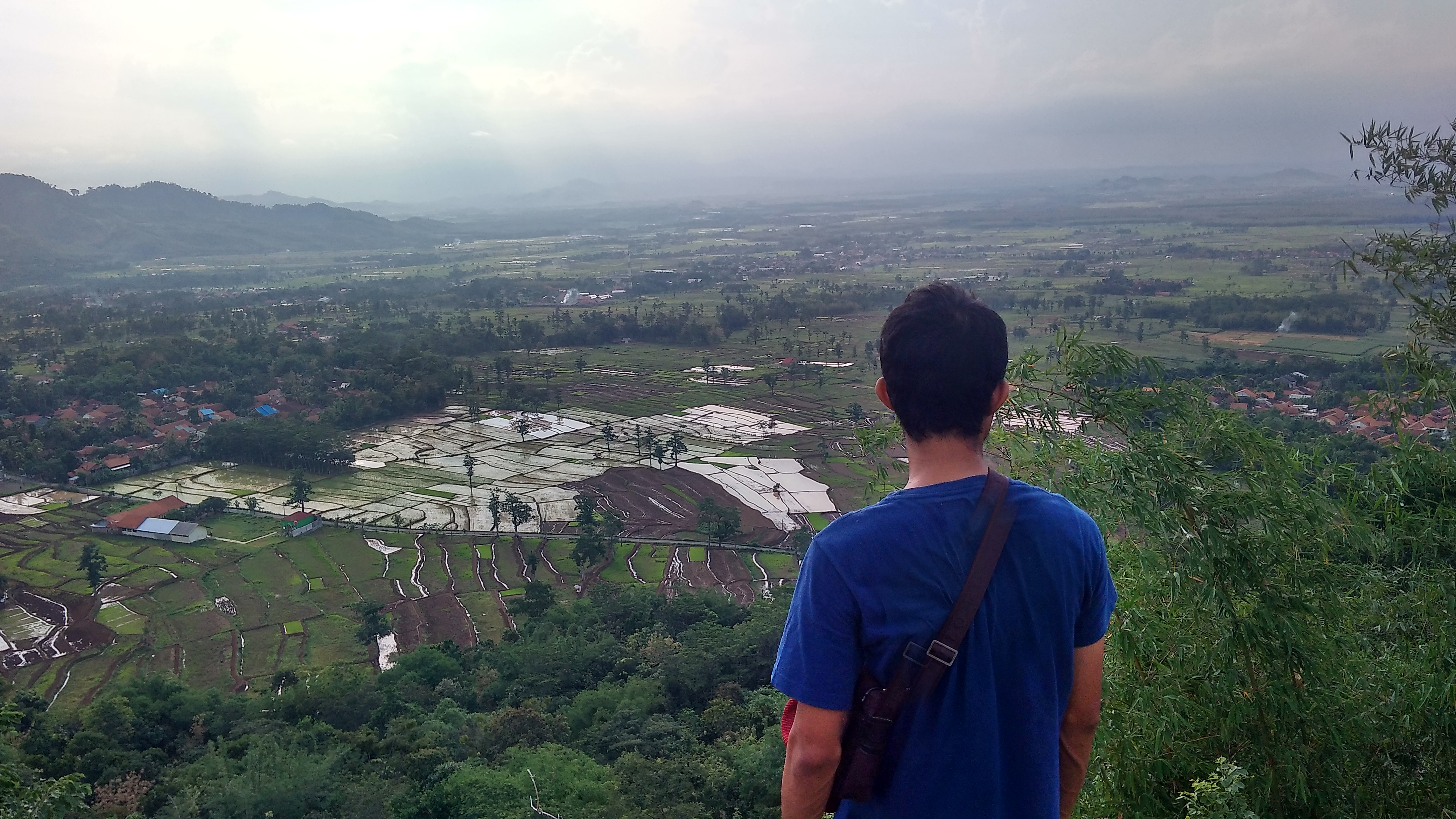 Pemandangan dari Bukit sebelah Barat Desa sesepan